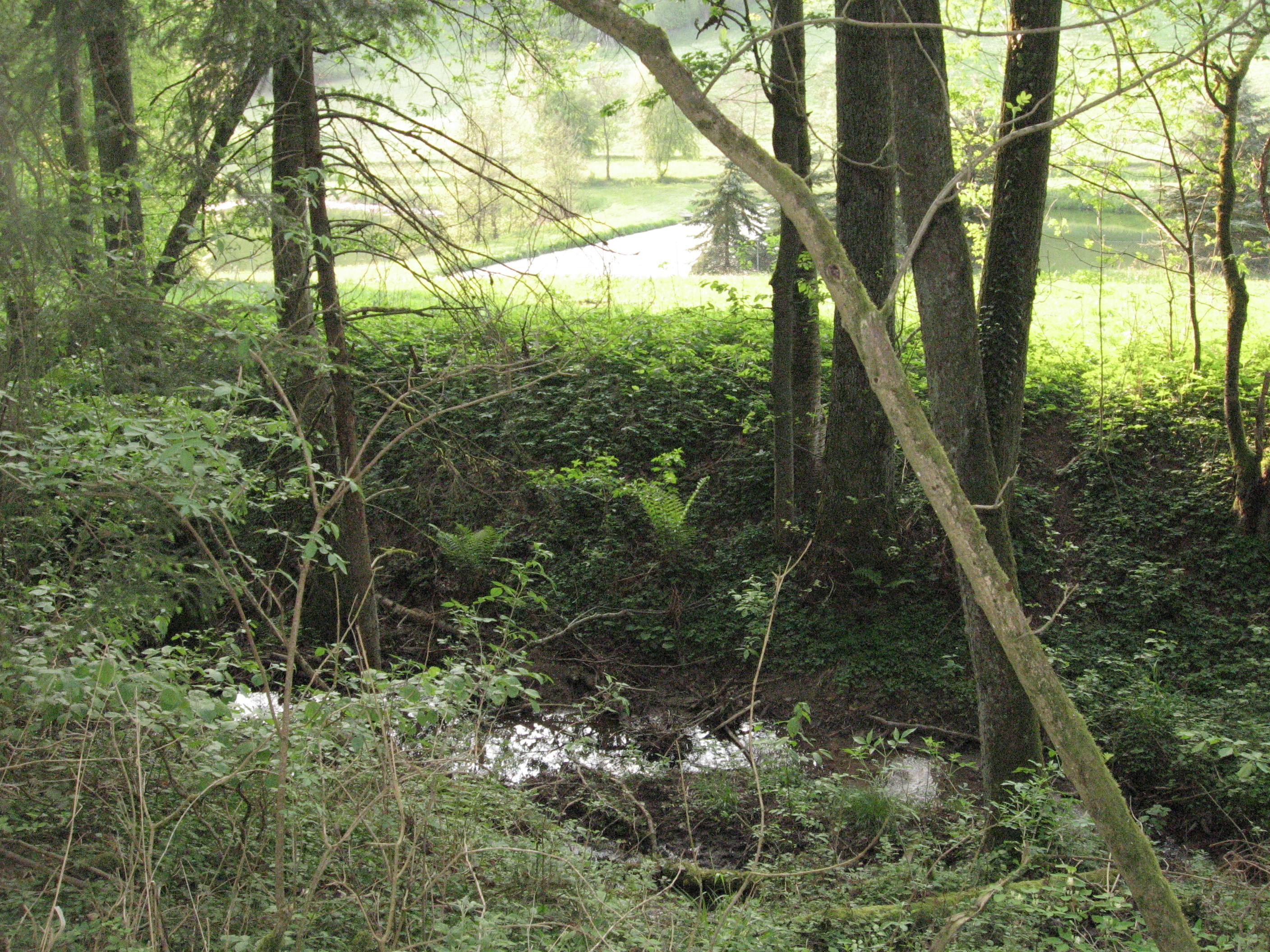 Der Avenbach, hier auch Sauerbach genannt (von rechts nach links), fließt am linken Hang seines Tales, dicht am Rand des Hangwaldes am Sauerberg. Dahinter tiefer in der Helle seines Tales zwei der drei Klärteiche von Bühlertann- Fronrot. Standort etwa 600 m S von Fronrot, Blick nach WNW.